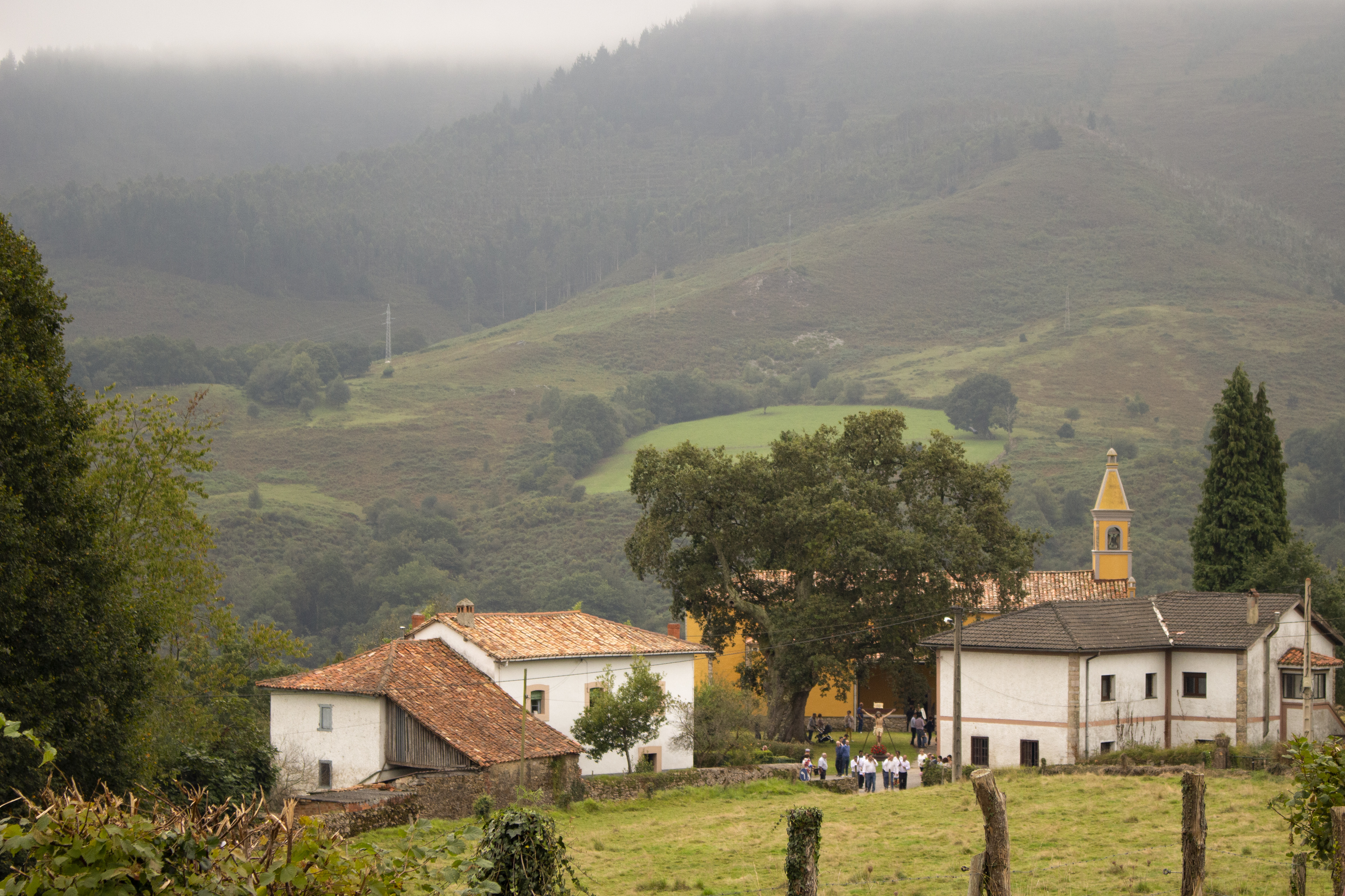 Coya (Piloña, Asturias)